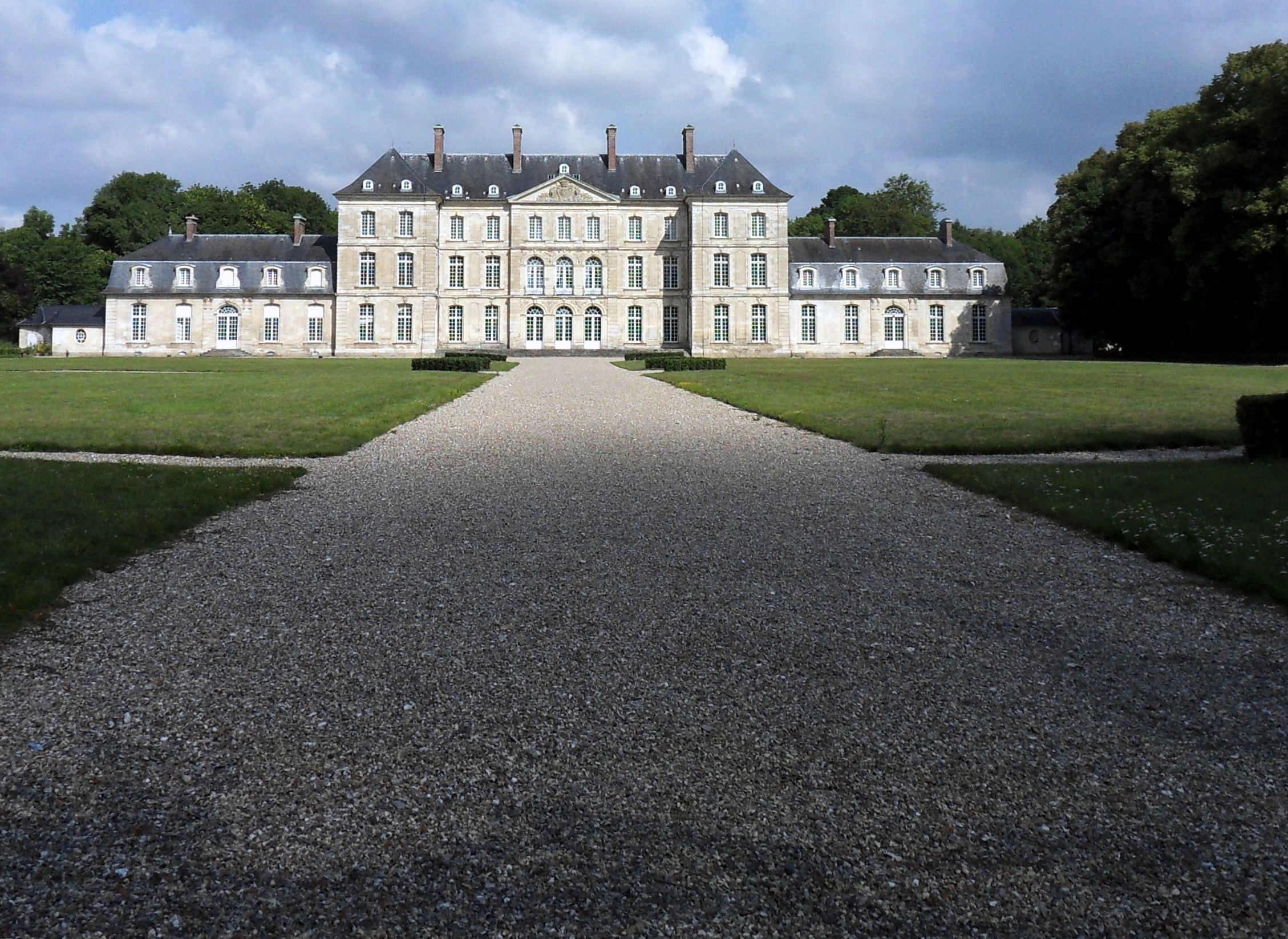 Bertangles (Somme, France). Le château.